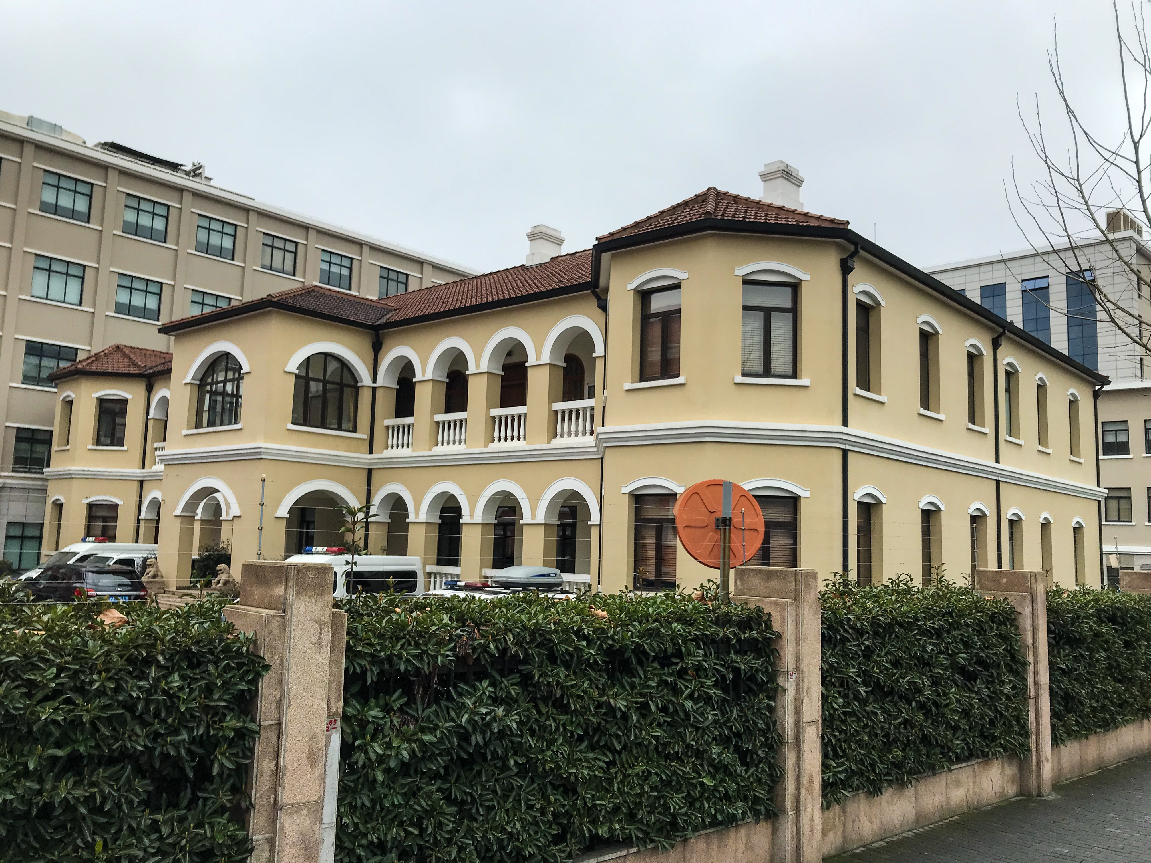 中文（中国大陆）: 上海特别市临时政府旧址 蓬莱路171号